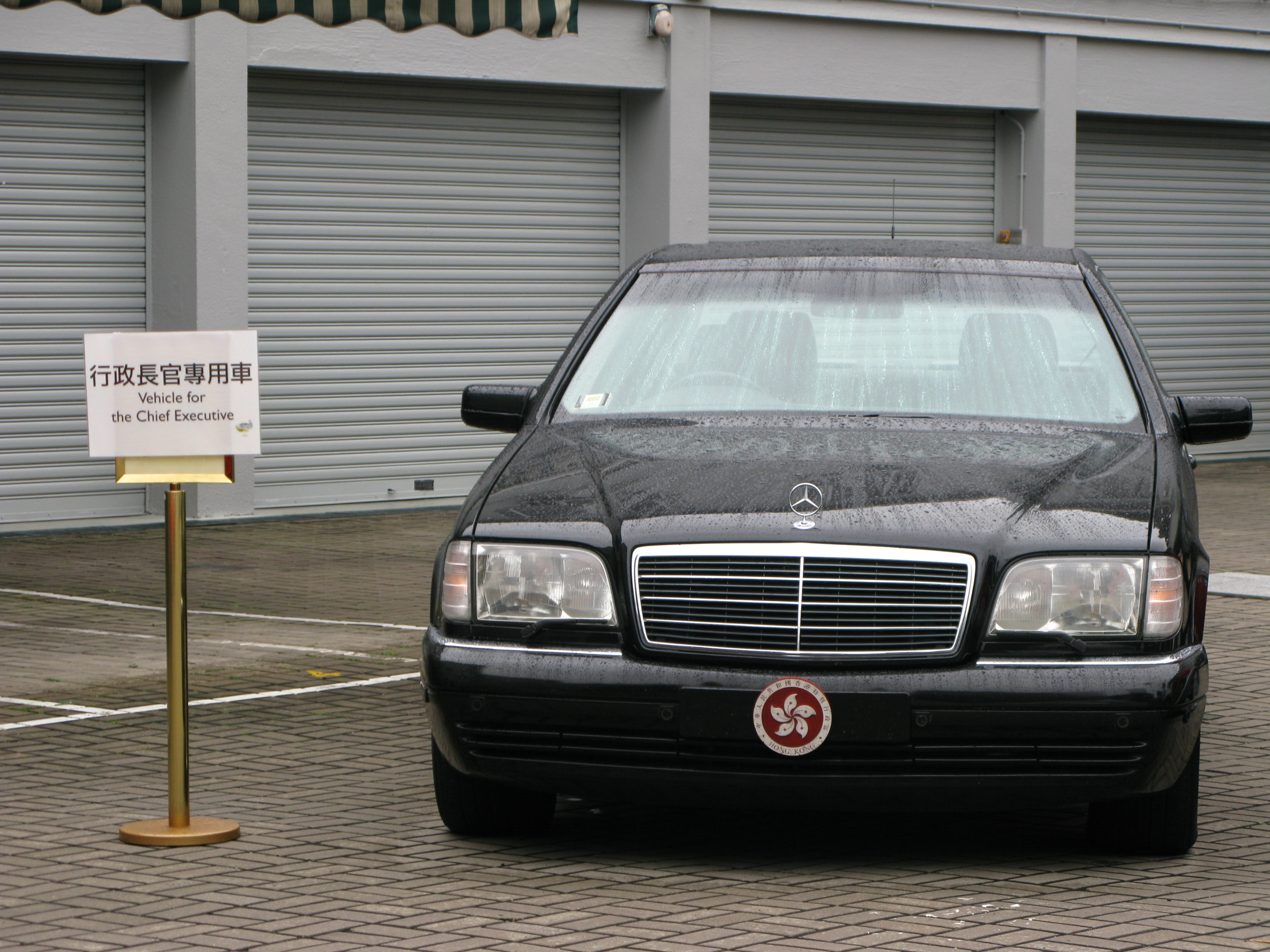 中文（香港）: 香港特別行政區行政長官專用車，展示於2010年香港禮賓府開放日中